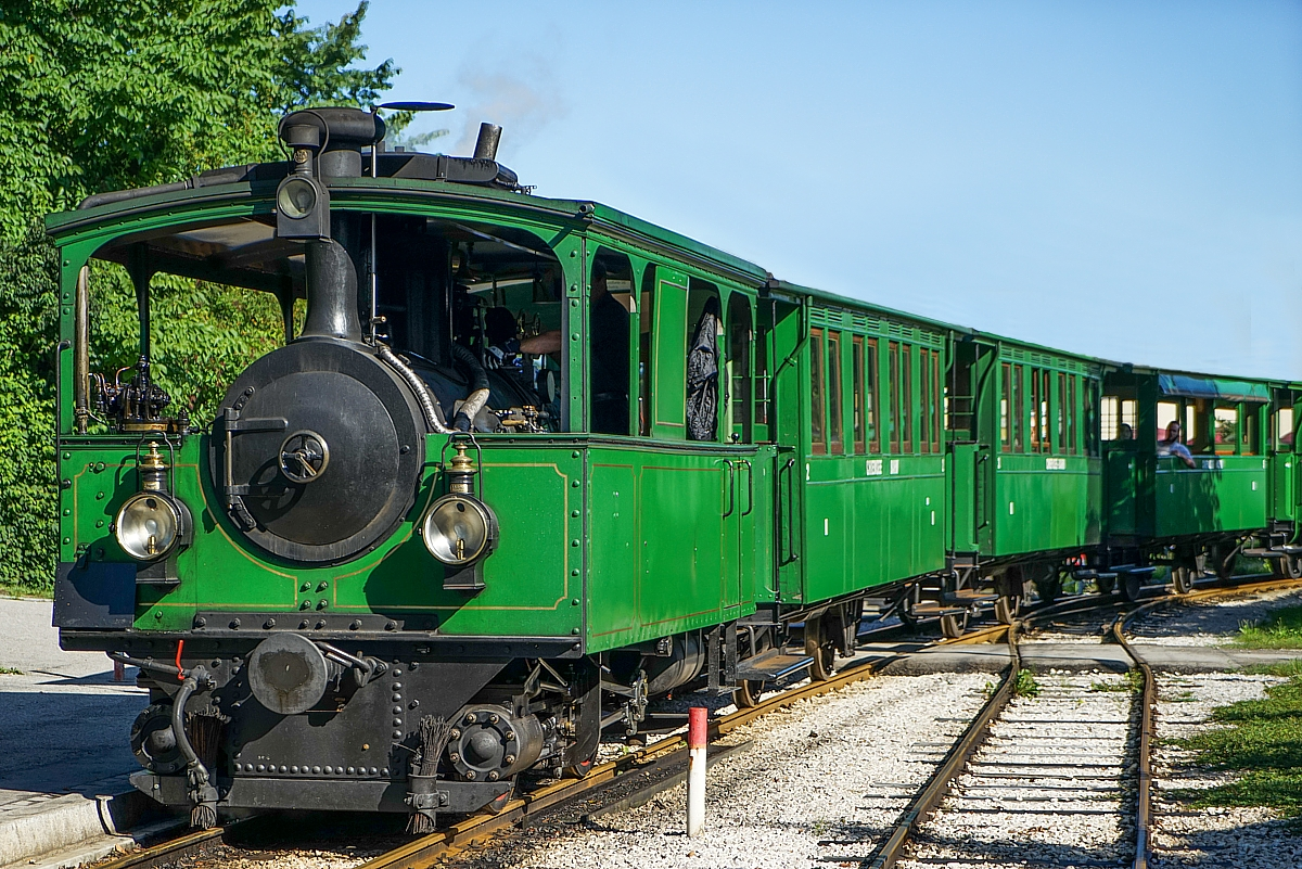 Die Chiemseebahn bei der Einfahrt in den Bahnhof Prien am Chiemsee